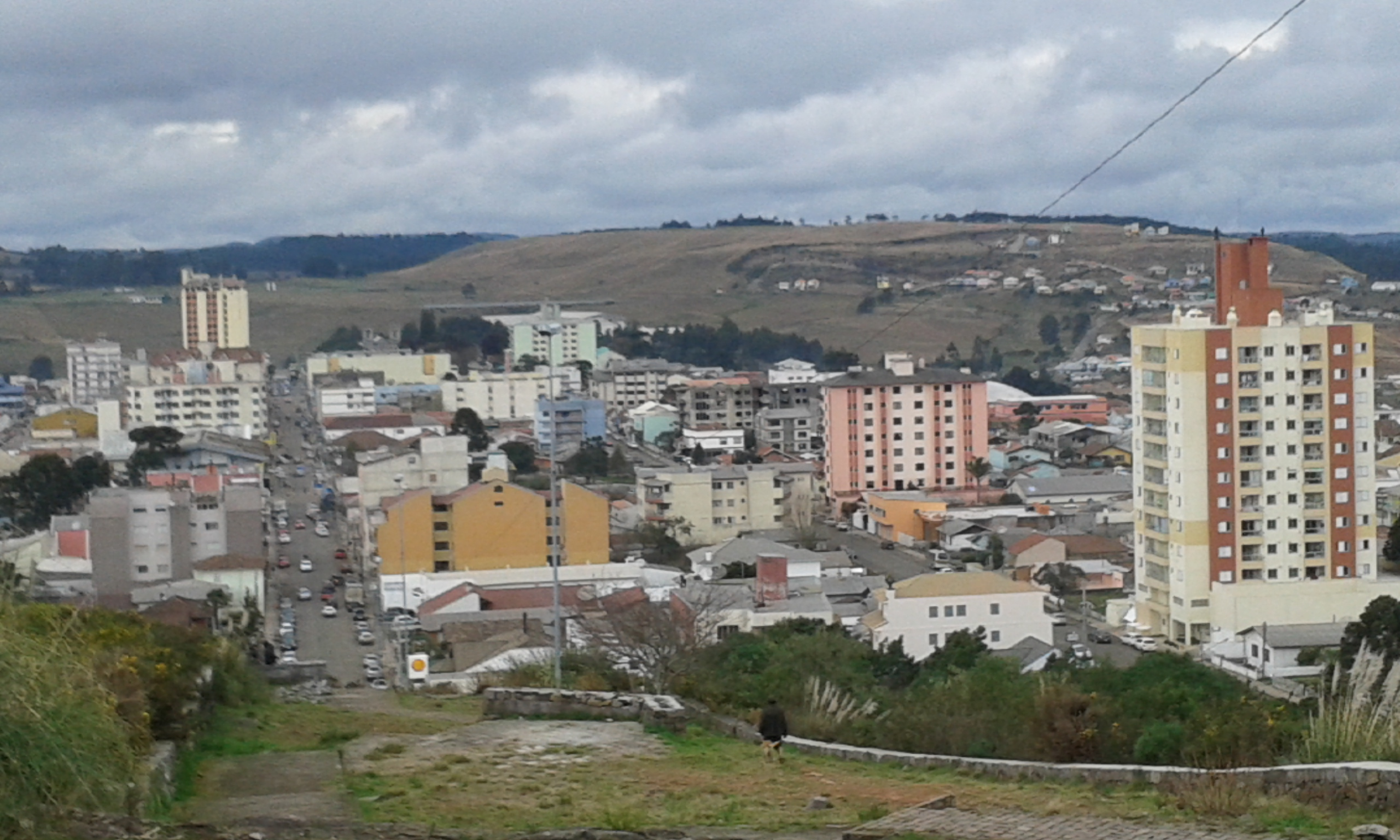 São Joaquim, SC, Brazil